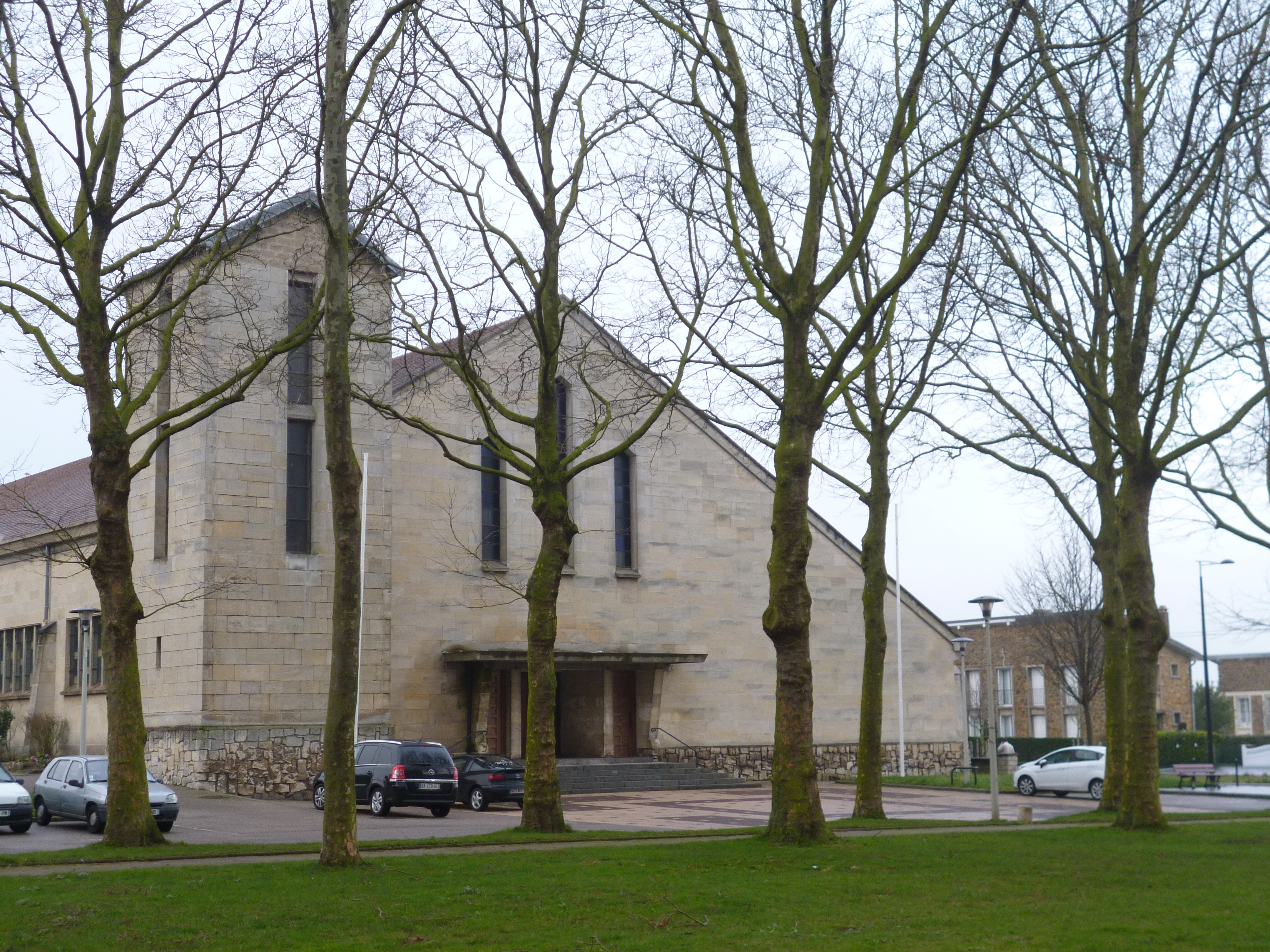 Eglise Saint-Paul - Aplemont (Le Havre -France)